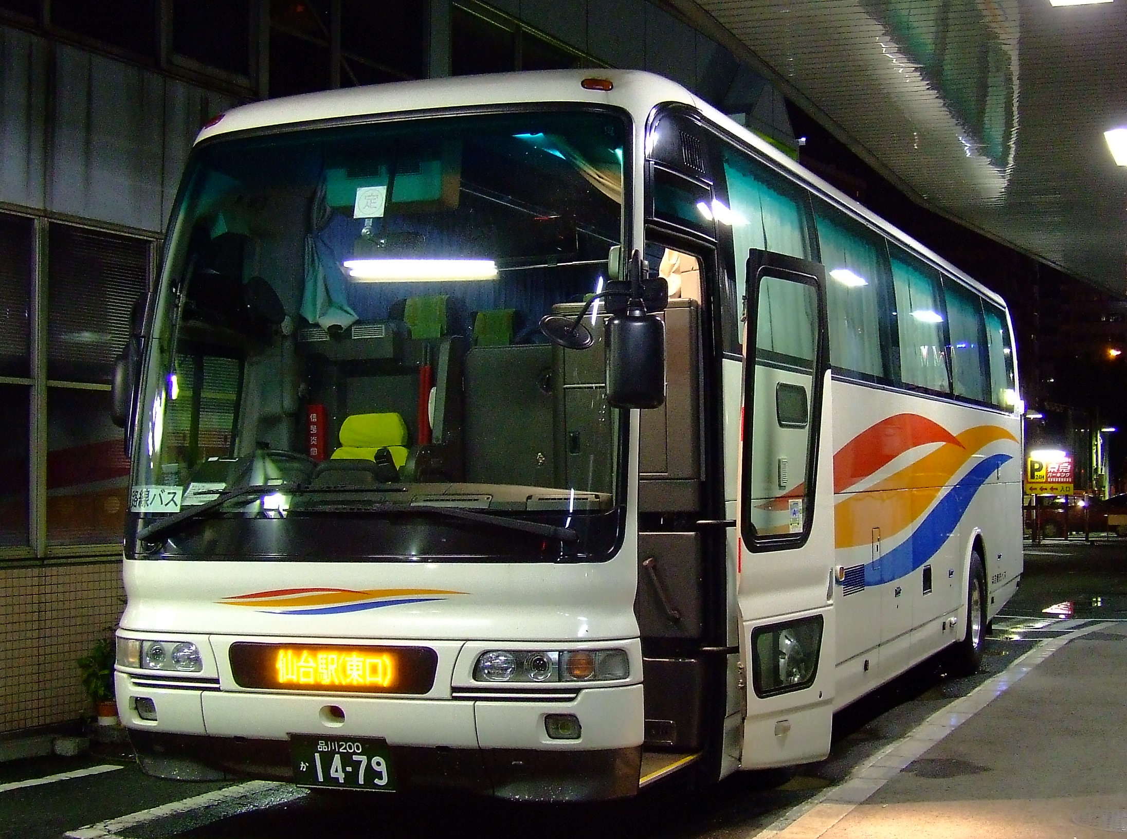 京急観光バスの高速バス仙台線（ドリーム横浜・仙台号） 品川バスターミナルにて